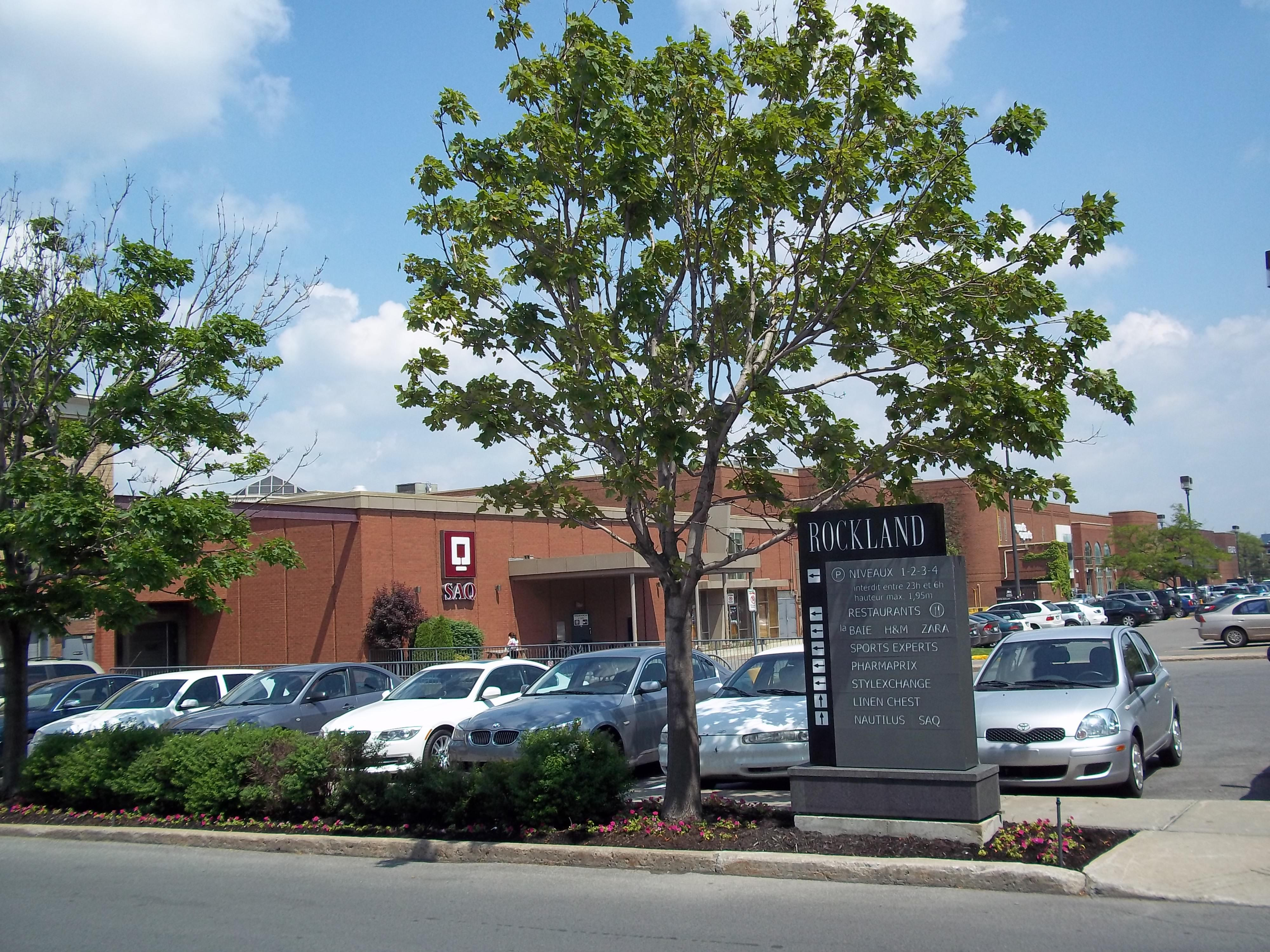 Vue extérieure du Centre Rockland à Montréal